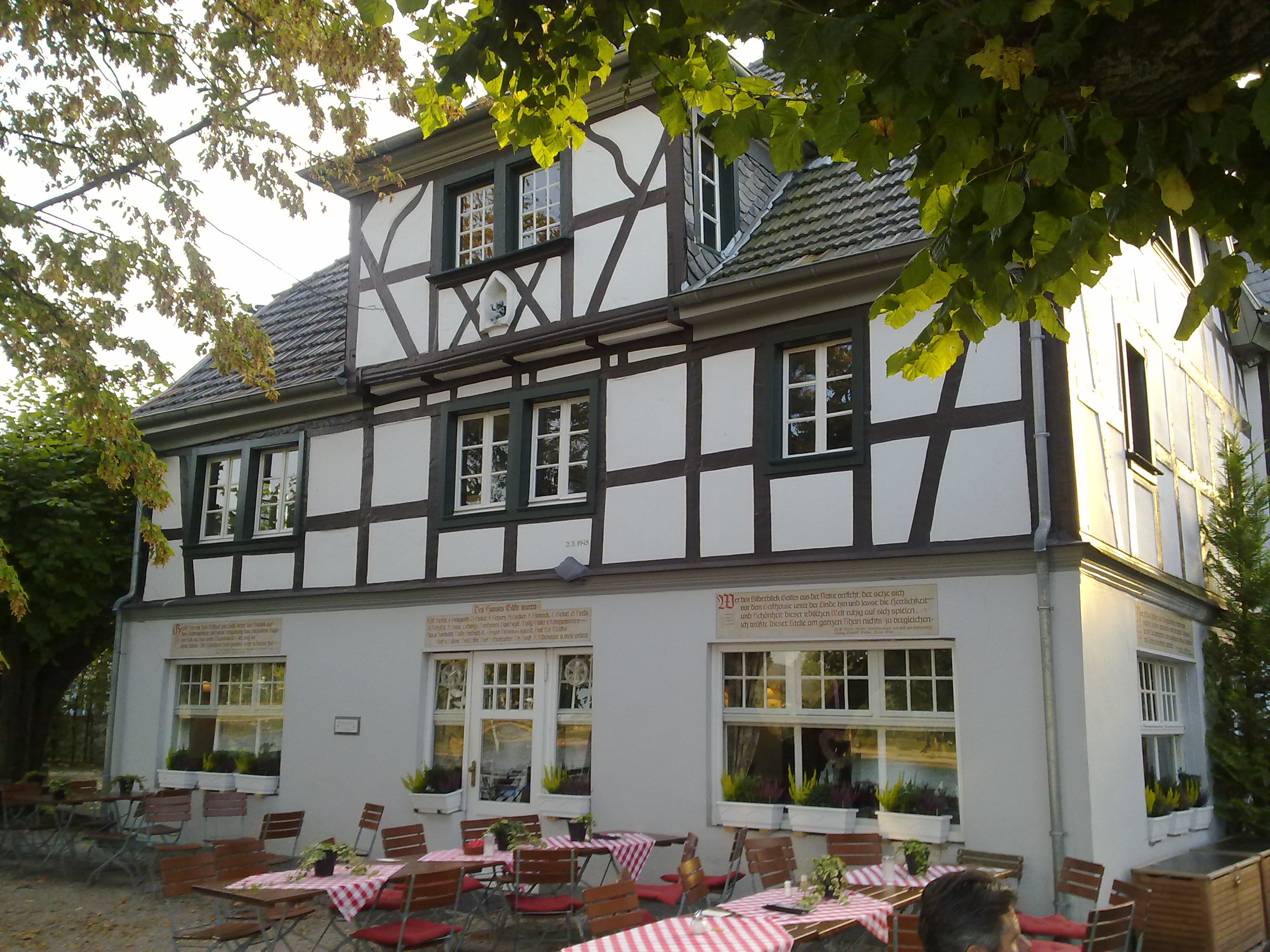 historische Gaststätte Schaumburger Hof (Ansicht Rheinseite) in Plittersdorf